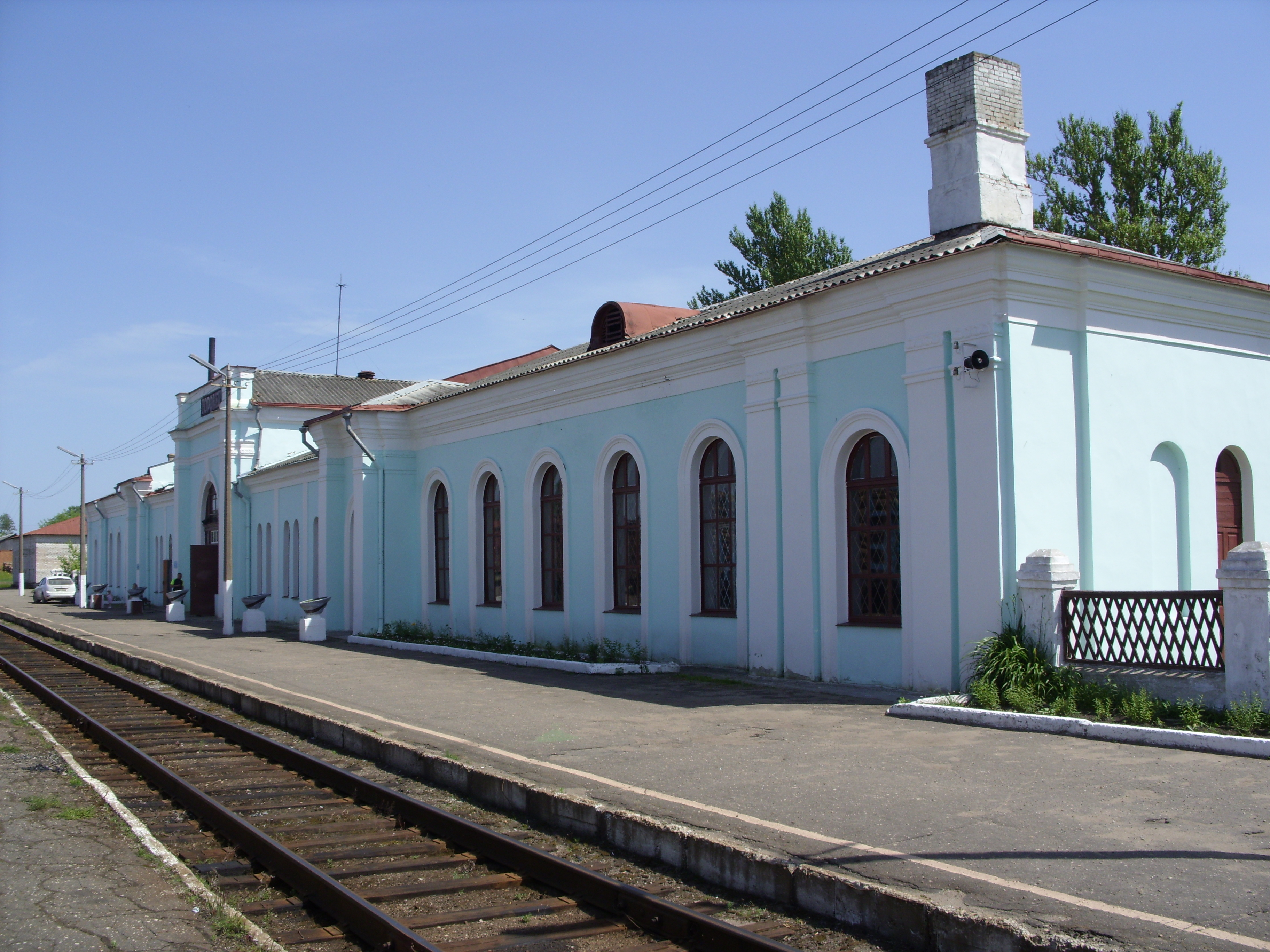 Toropets. Vokzal